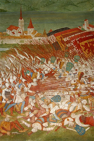 Schlachtfresko (von Manuel/Wägmann/Balmer): Arnold v.Winkelried